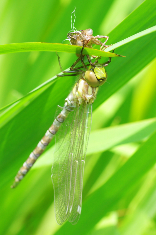 Żagnica sina (Aeshna cyanea) - przeobrażenie. Skrzydła rozprostowują się, ciało nabiera barw i sztywnieje.